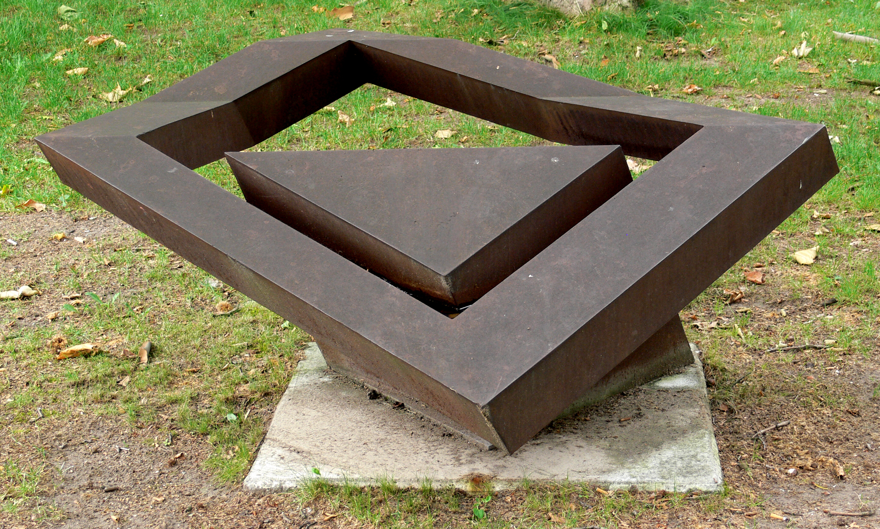 Skulpturengarten Nürnberg (Zwinger der Frauentormauer) Hiromi Akiyama: 84-3-E, Verschiebung Nr. 7, 1984, Grauguss (Stiftung Dr. Gustl Drechsler und da Vinci Künstlerpinselfabrik GmbH, Nürnberg 2005)